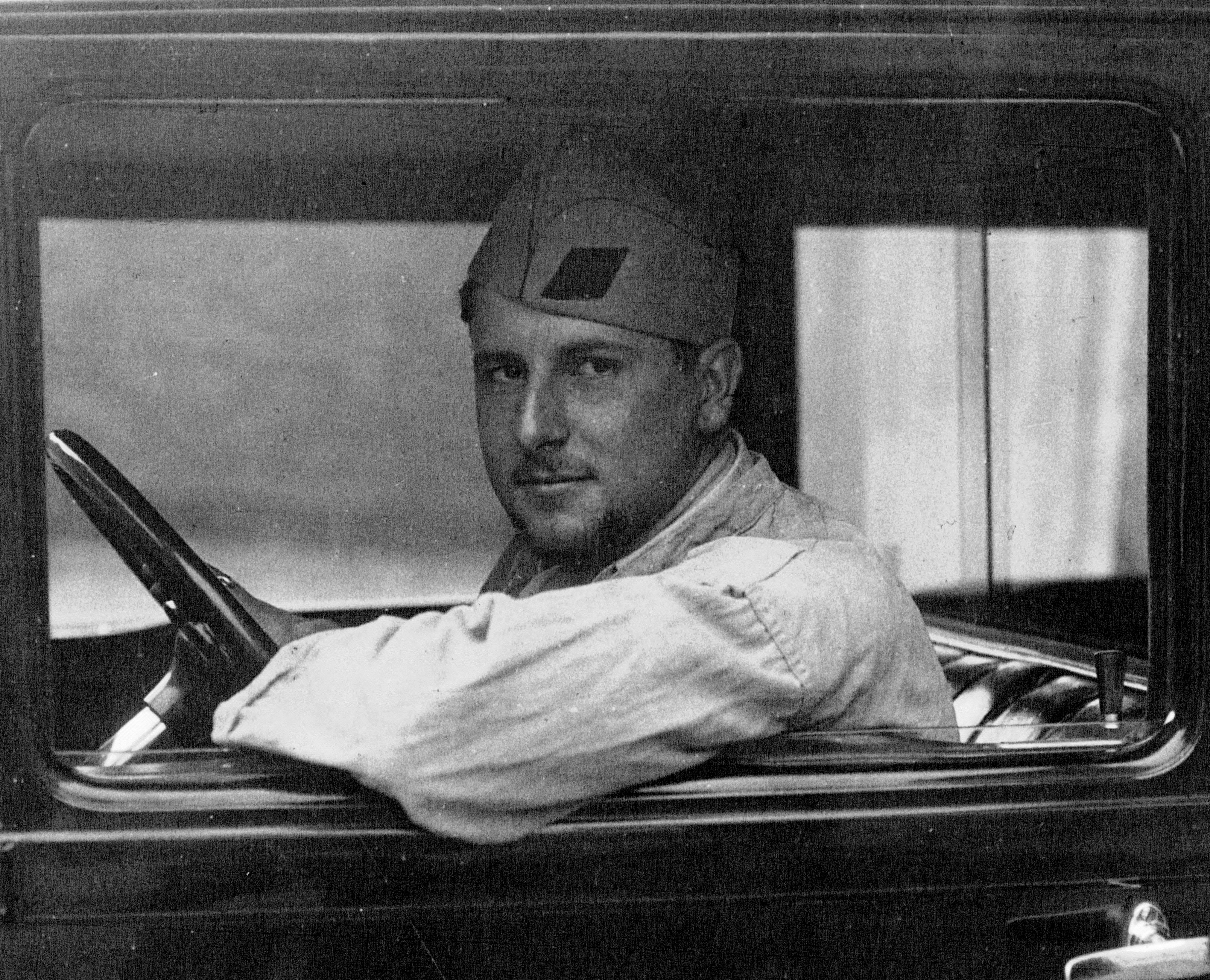 J. Lebrun, champion olympique (yatch).